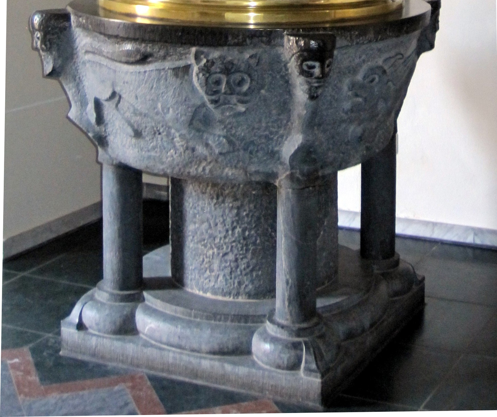 Friesheim Kirche Sankt Martin